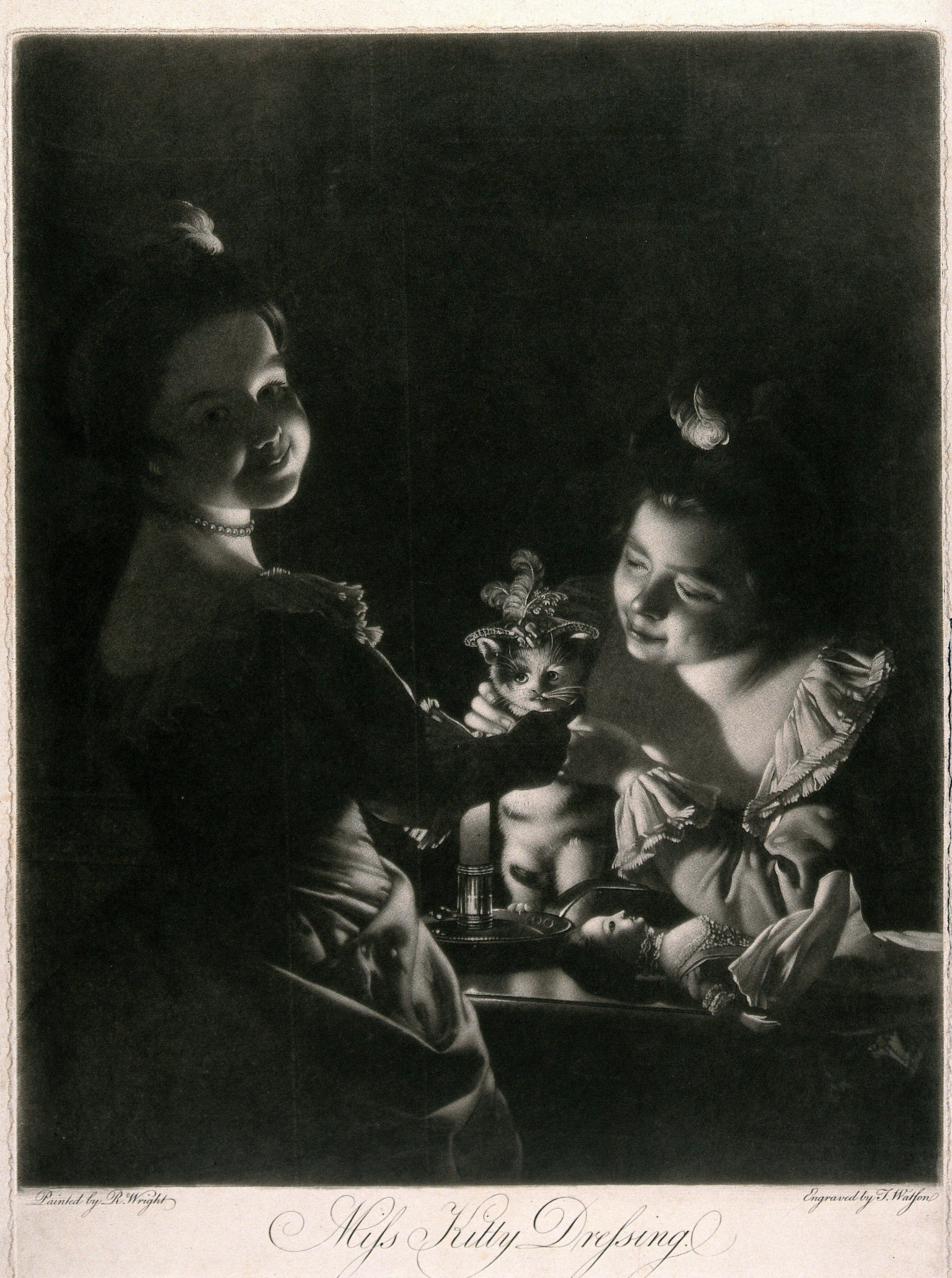 Contributors Wright, Joseph, 1734-1797.Watson, Thomas, 1750-1781. Lettering Miss Kitty dressing. Painted by R. Wright. Engraved by T. Watson. Publication/Creation London (No. 158 New Bond Street) : Watson & Dickinson, Feby. 20th 1781. Physical description 1 print : mezzotint ; image 40.9 x 32.8 cm Publications note J. Chaloner Smith, British mezzotinto portraits, vol. 4, London 1883, no. 47, pp. 1576 Reference Wellcome Library no. 28716i Type/Technique Mezzotints.